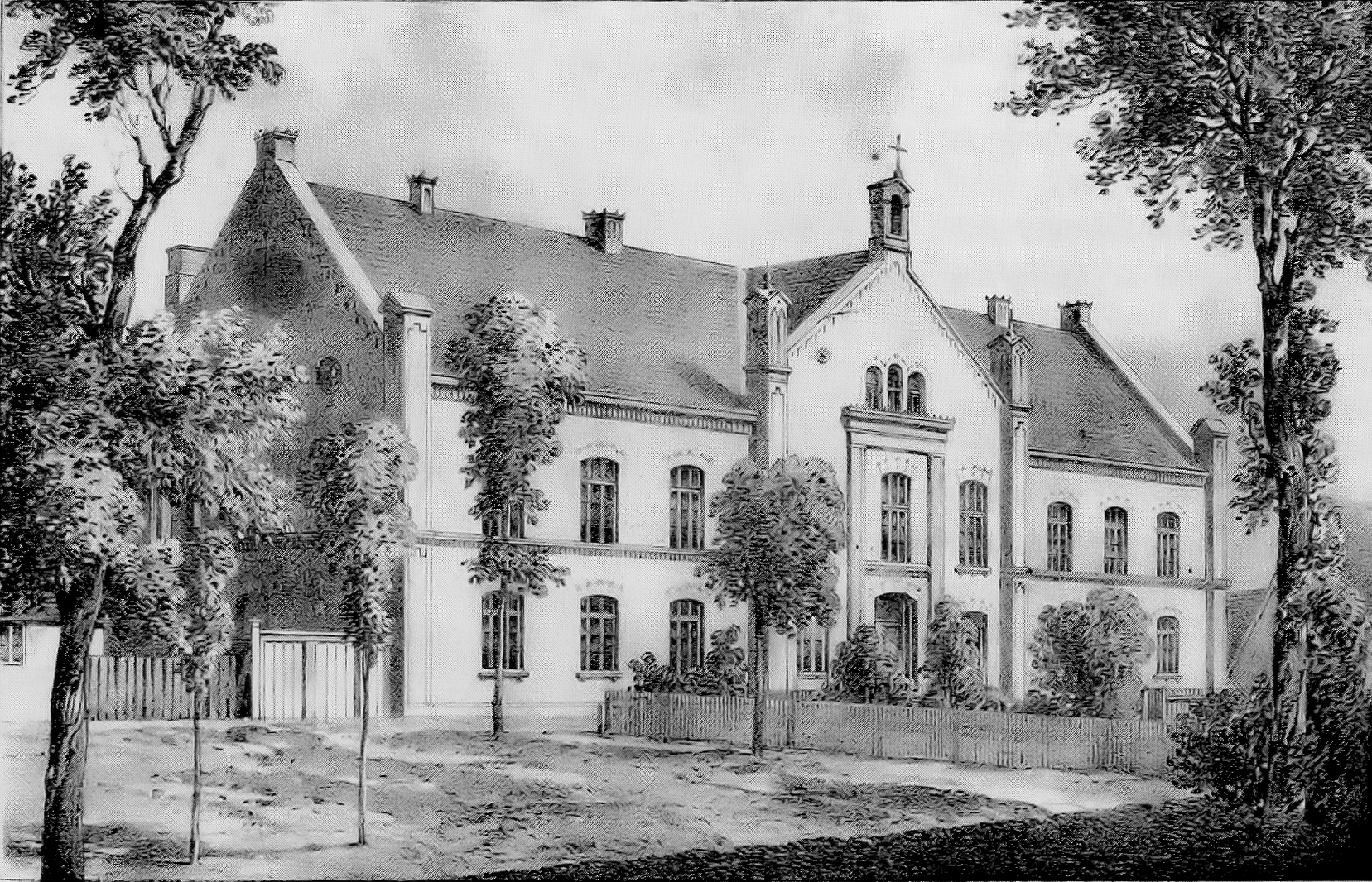 Ludwigslust, Stift Bethlehem 1855